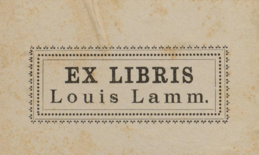 Unterschrift von Louis Lamm in einem Buch der Württembergischen Landesbibliothek Stuttgart